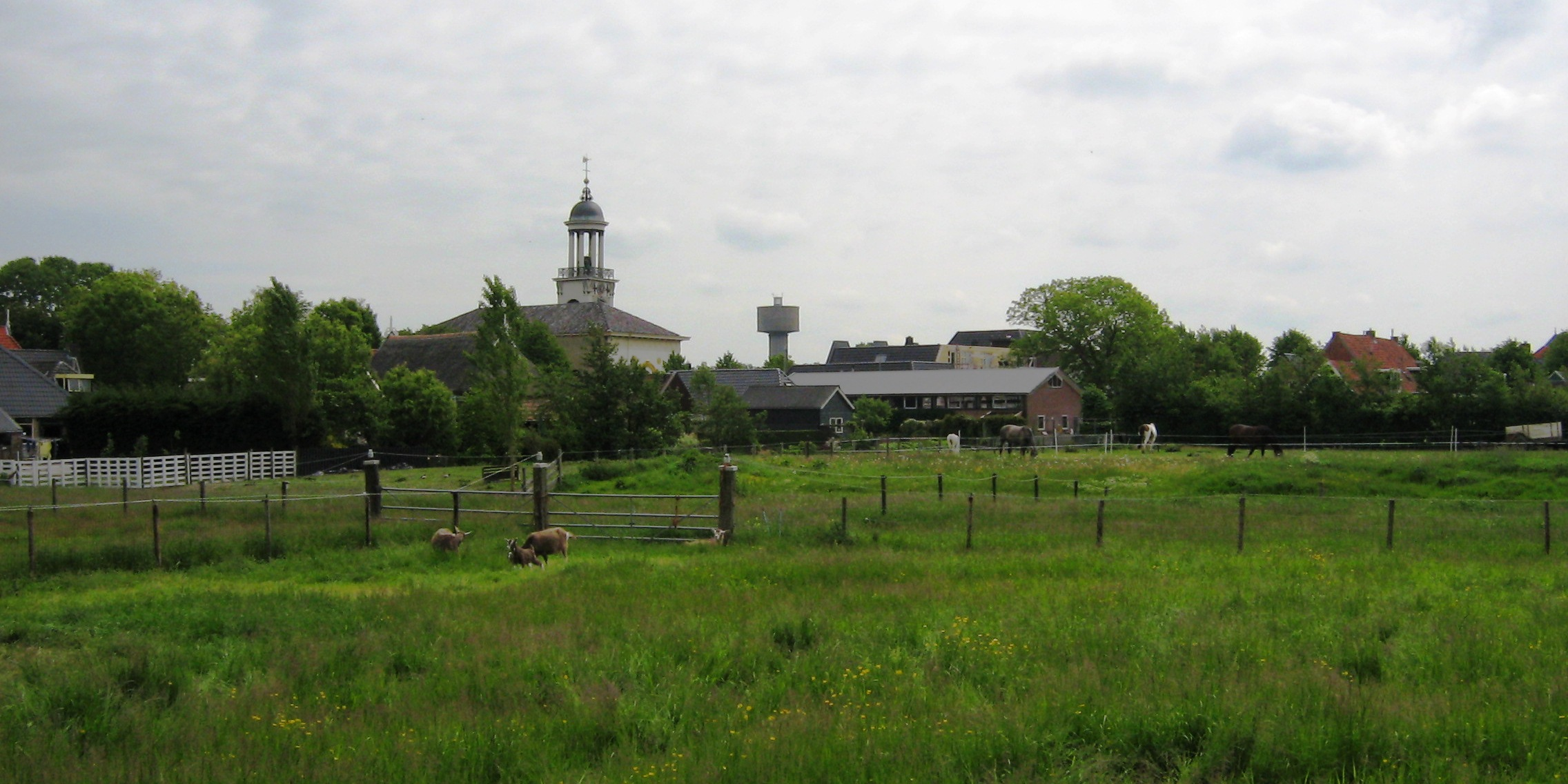 Genomen met mijn eigen camera, zicht op de watertoren en kerk in Sint Jacobiparochie